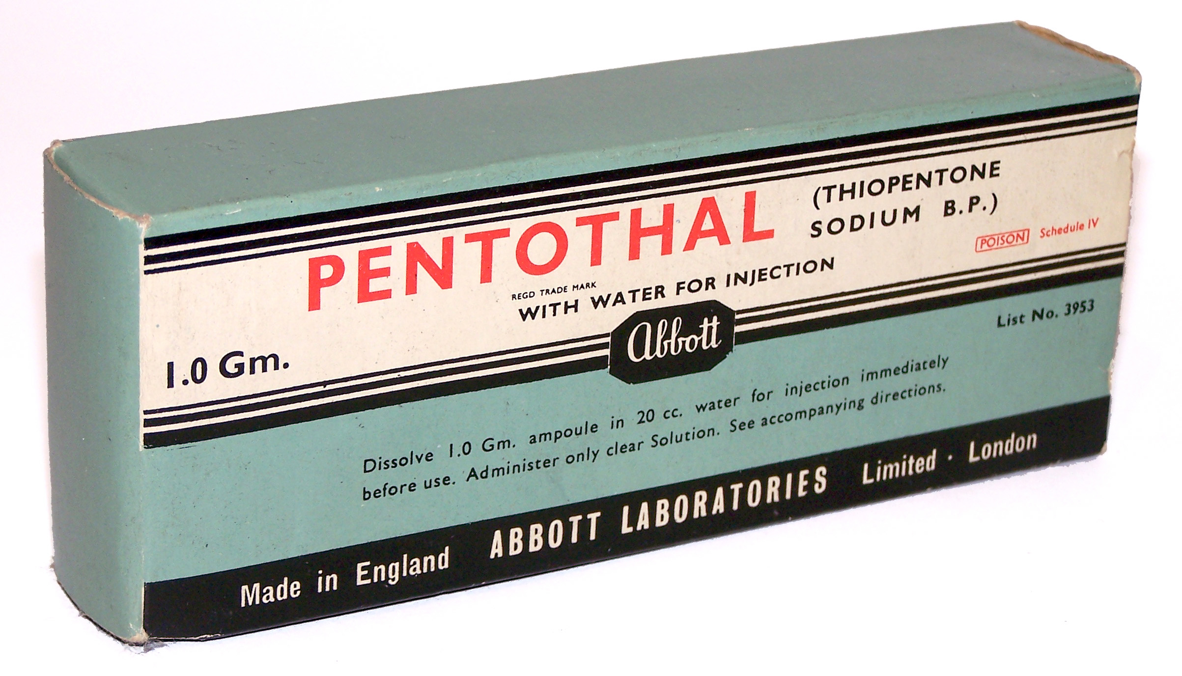 Le célèbre sérum de vérité! The famous truth serum !